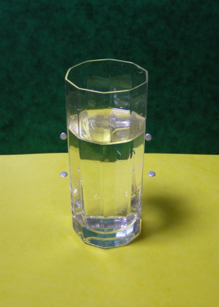 自宅で投稿者が撮影したja:コップの写真。